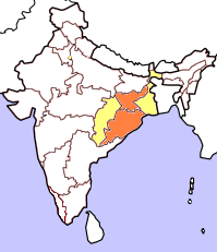 Valkarta i senaste delstatsval. Lite osäkert ifall ingen JMM-kandidat ställde upp i det som blev kvar av Bihar efter delningen.